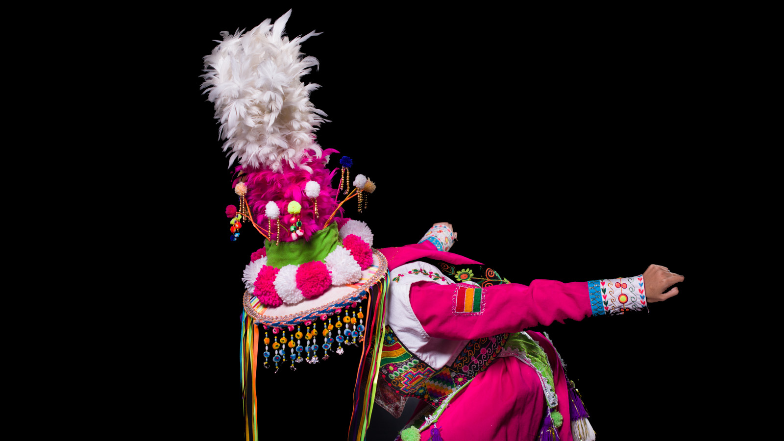 Foto de estudio de tinku tomada durante los corsos de Oran, Salta, Argentina